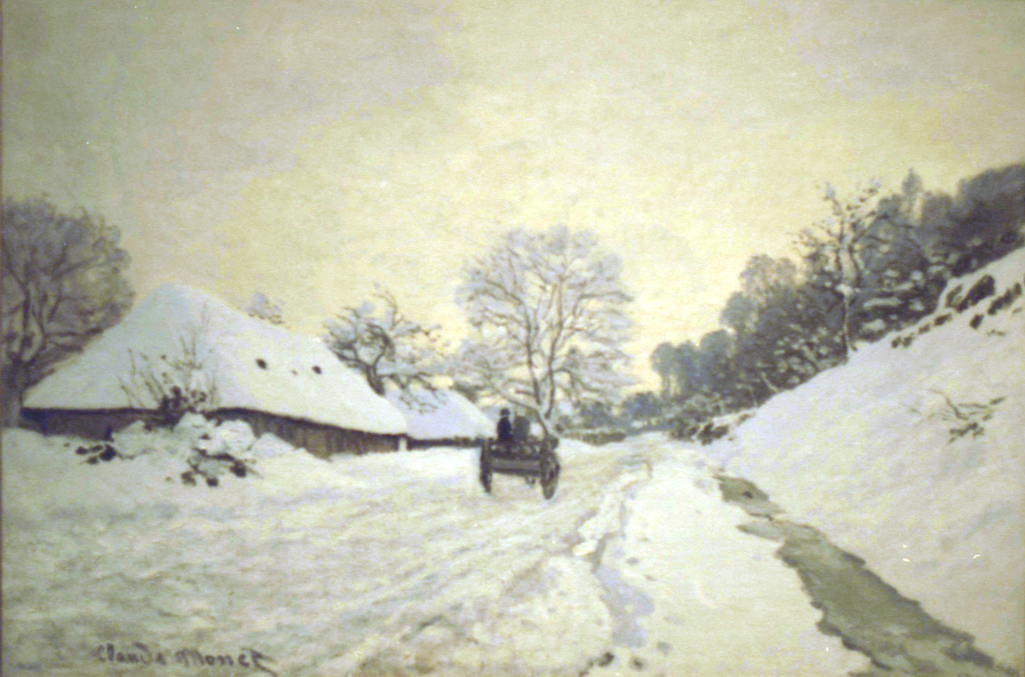 "La Charrette, route sous la neige à Honfleur"